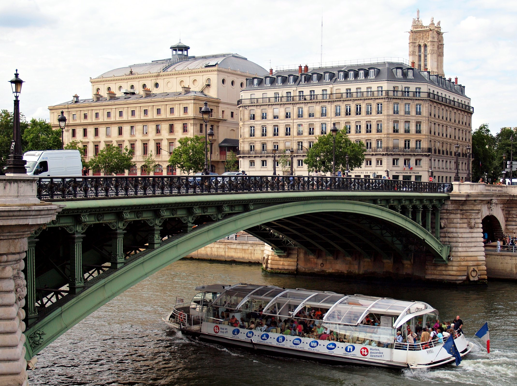 Pont Notre-Dame.